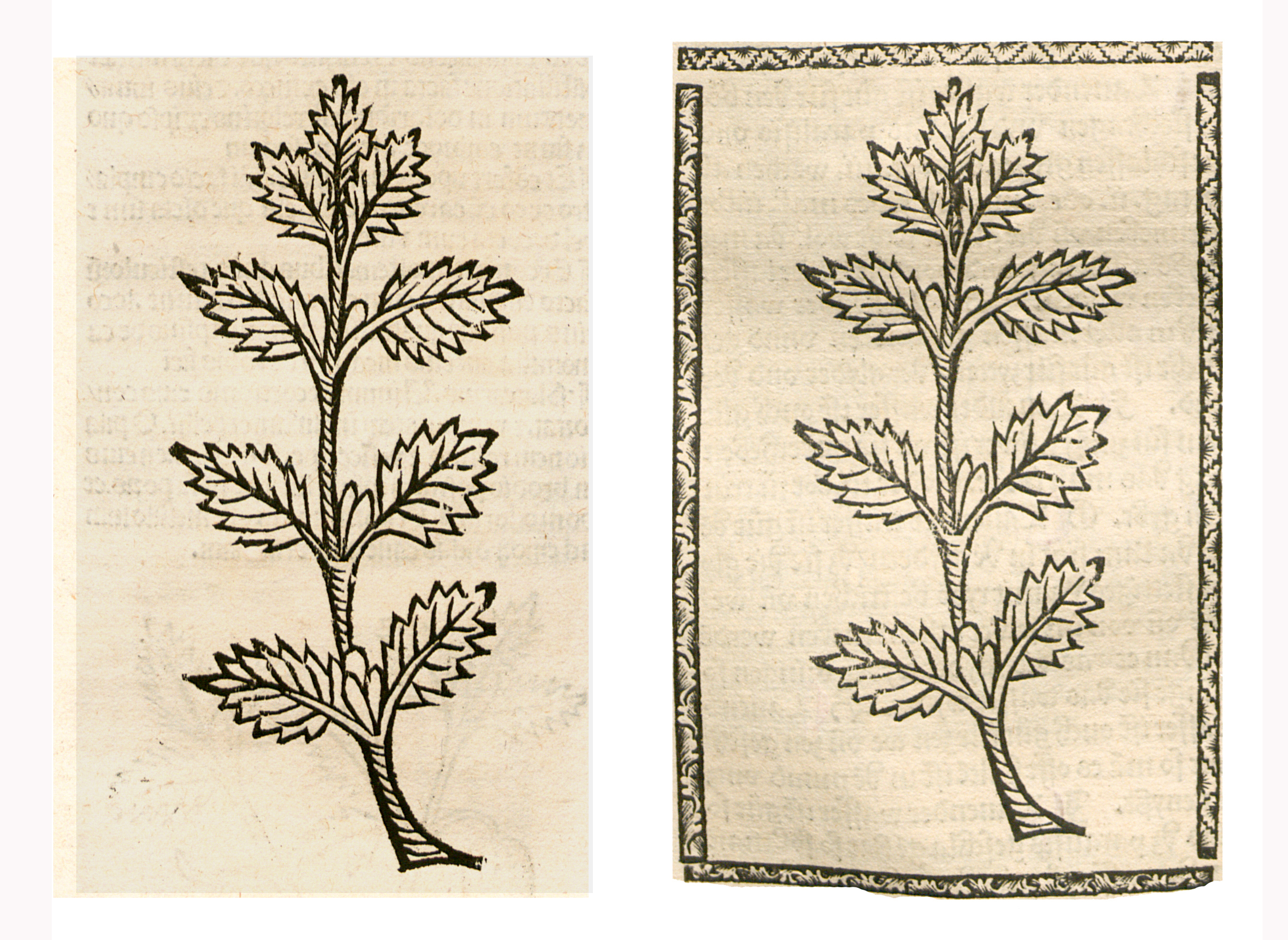 Abbildung von: Muter Krut (Melissa officinalis)